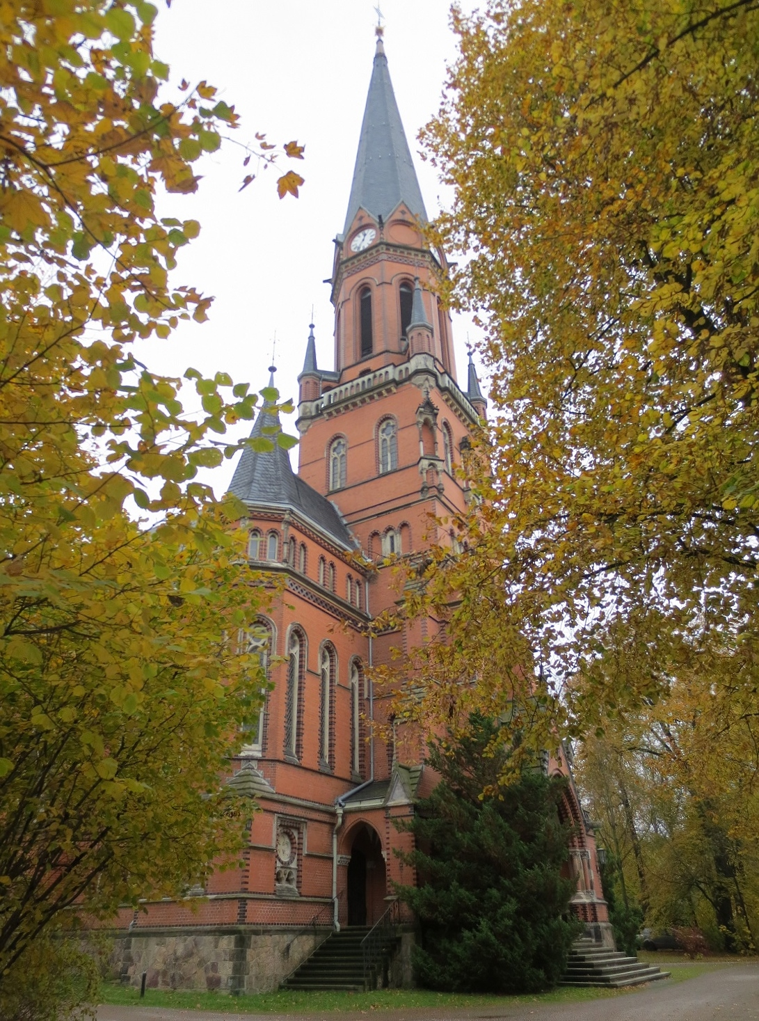 Kulturdenkmal Chemnitz Altchemnitz.